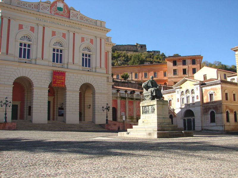 Piazza XV marzo, Cosenza. In primo piano la statua di Bernardino Telesio, sullo sfondo il teatro Rendano, la biblioteca Civica e l'accademia Cosentina